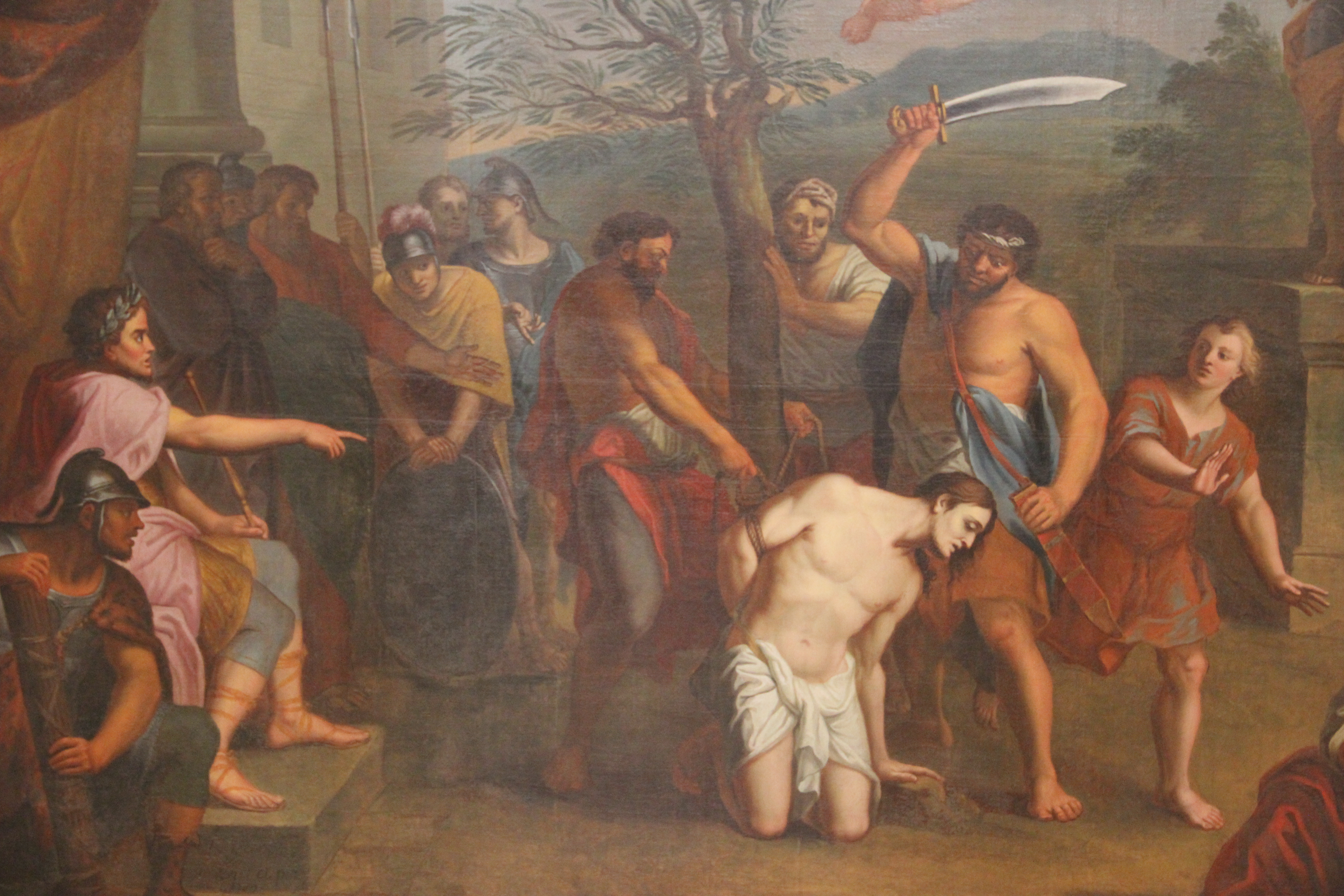 Tableau représentant la décapitation de Saint-Pantaléon à l'intérieur de l'église.